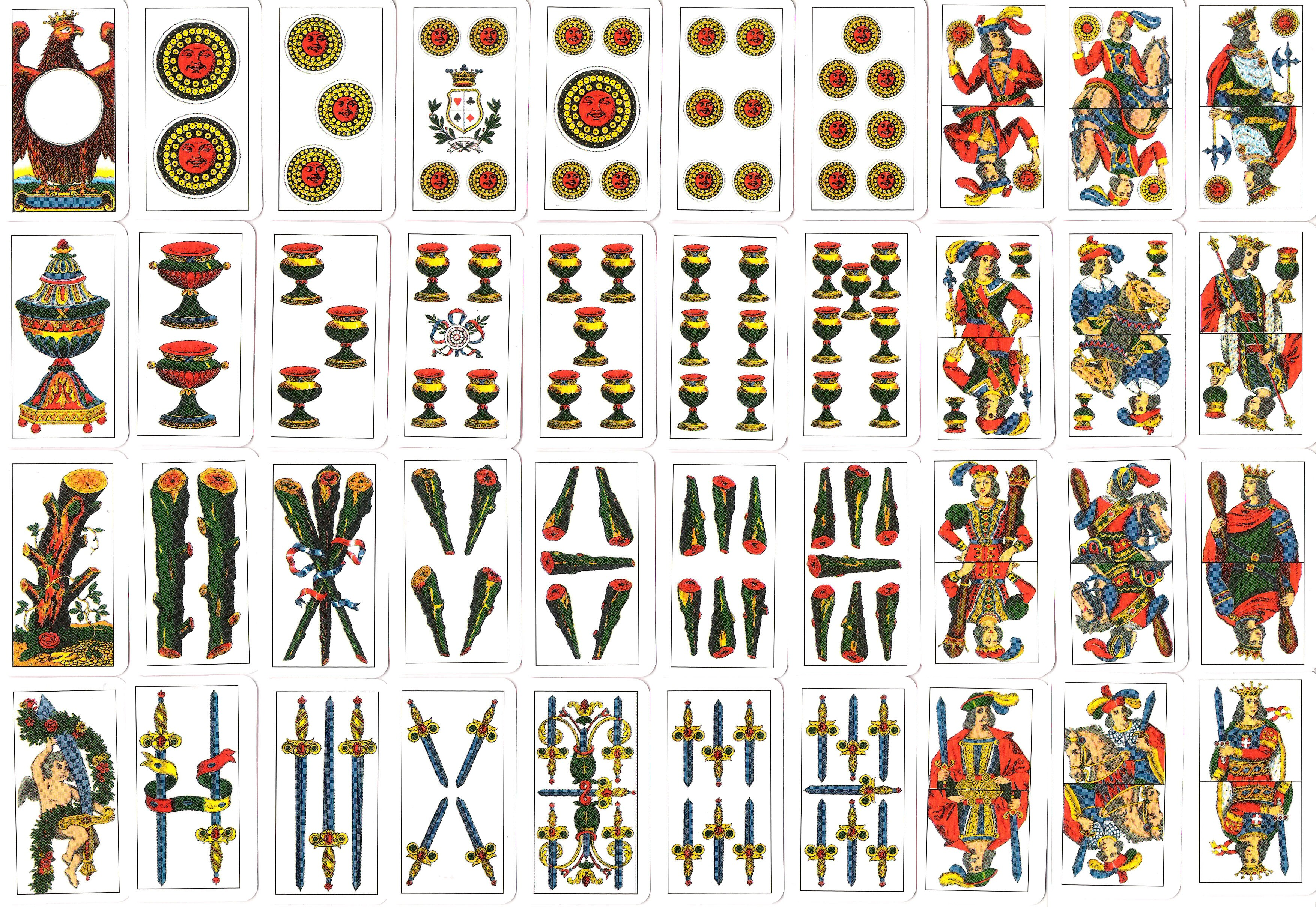 scansione di tradizionali carte piacentine